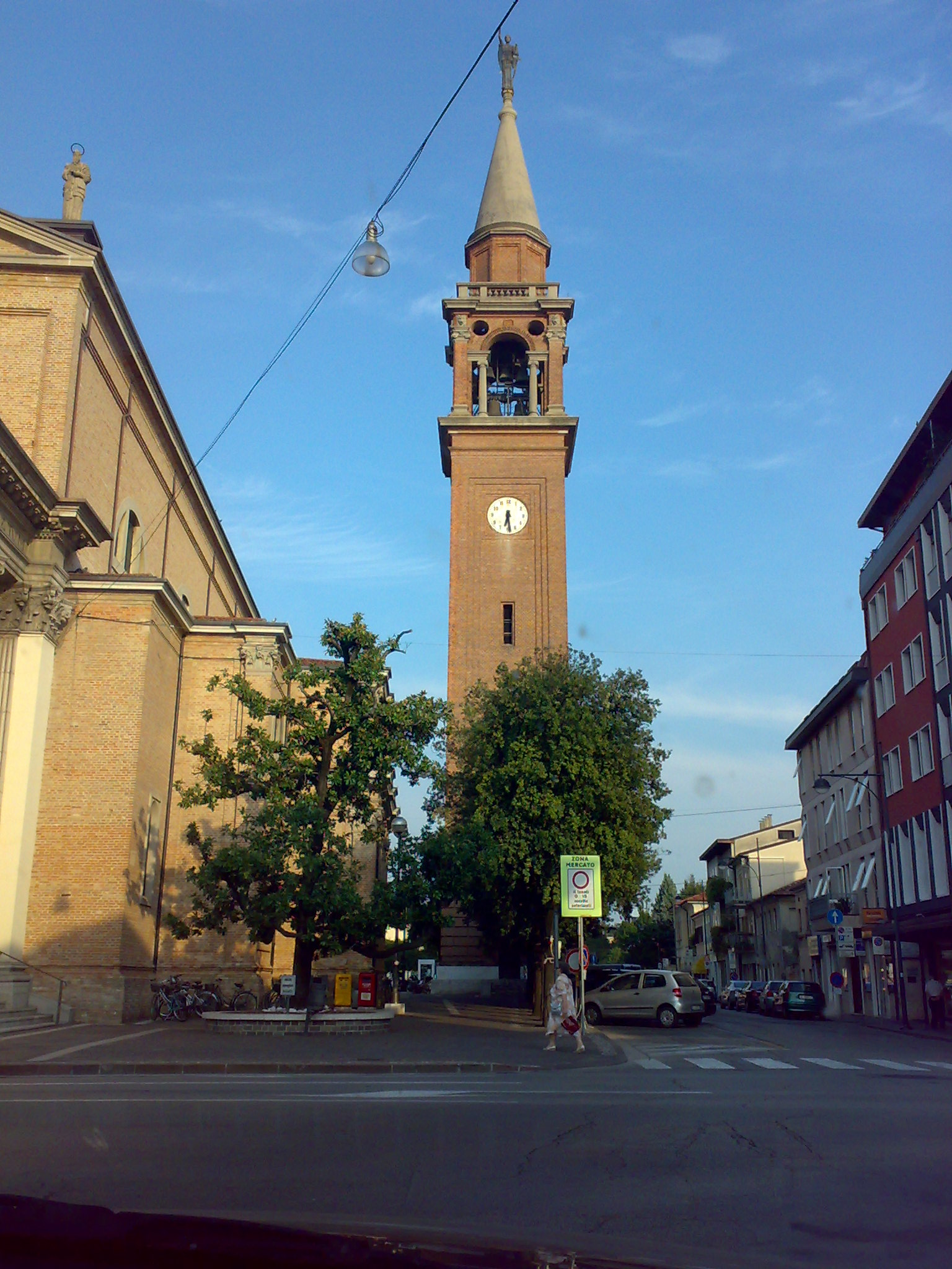 Campanile - San Donà di Piave